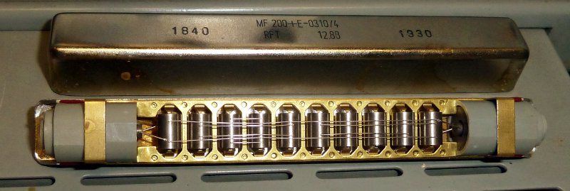 Filterbaustein mit der Bezeichnung MF 200 + E Bauart: mechanisches Filter mit Torsions-Resonatoren für eine Trägerfrequenzanlage